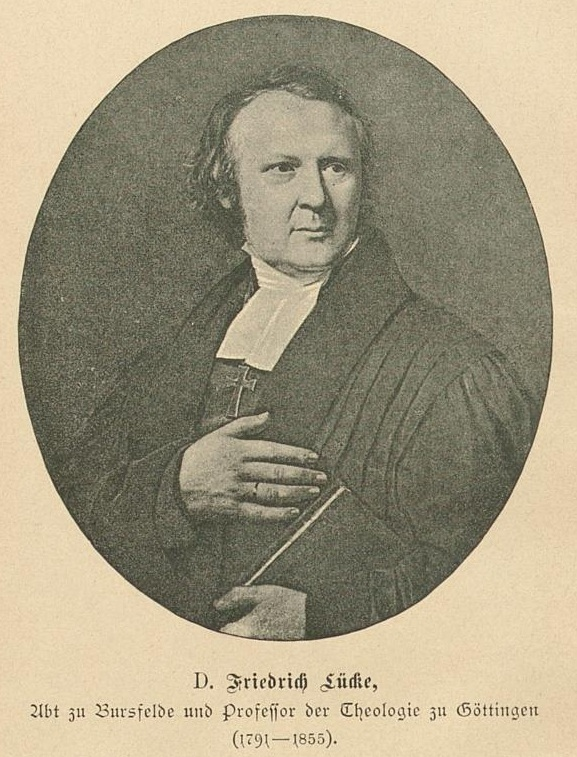 Готфрид Христиан Фридрих Люкке